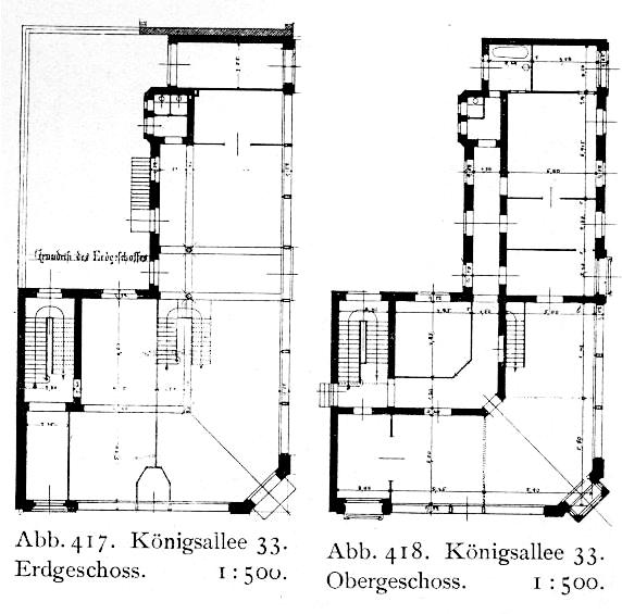 Geschäftshaus Otto Wehle, Königsallee 33 in Düsseldorf, für das "Haus und Kücheneinrichtungsgeschäft Otto Wehle", von Architekten "Tüshaus & von Abbema" erbaut, Grundriss